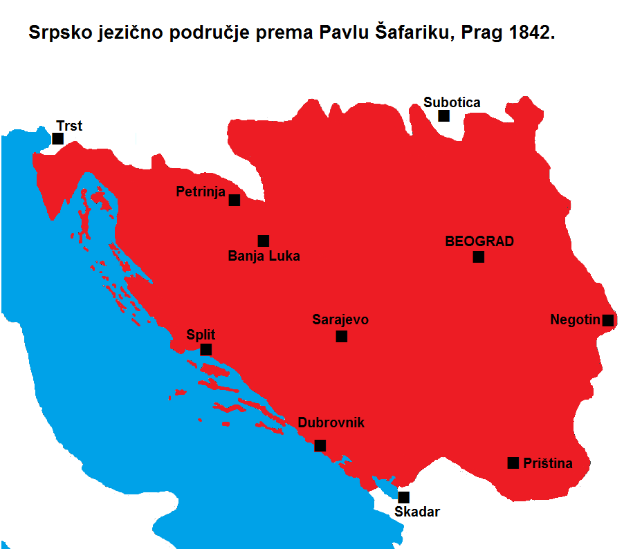 Srpsko jezičko područje prema Pavlu Šafariku, Prag 1842